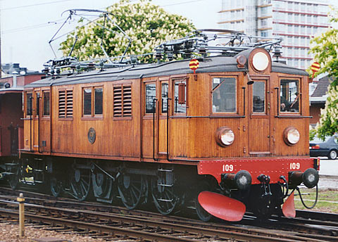 D-lok i Malmö